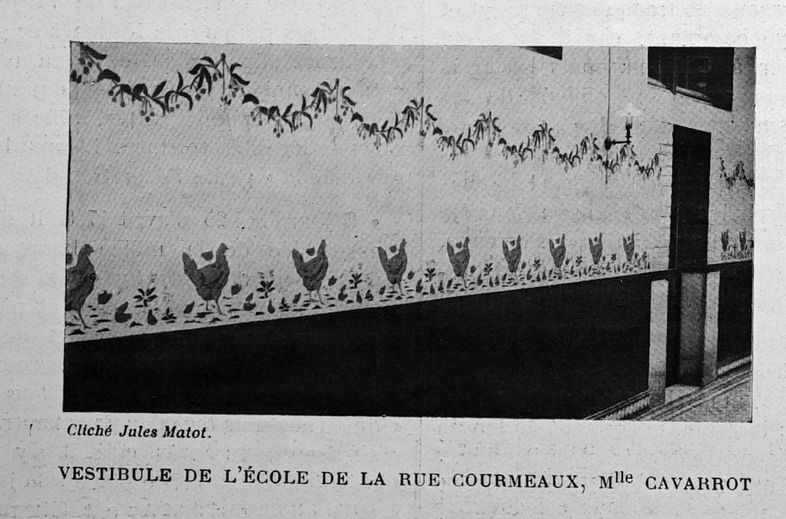 publié dans le "Bulletin de l'œuvre des voyages scolaires".